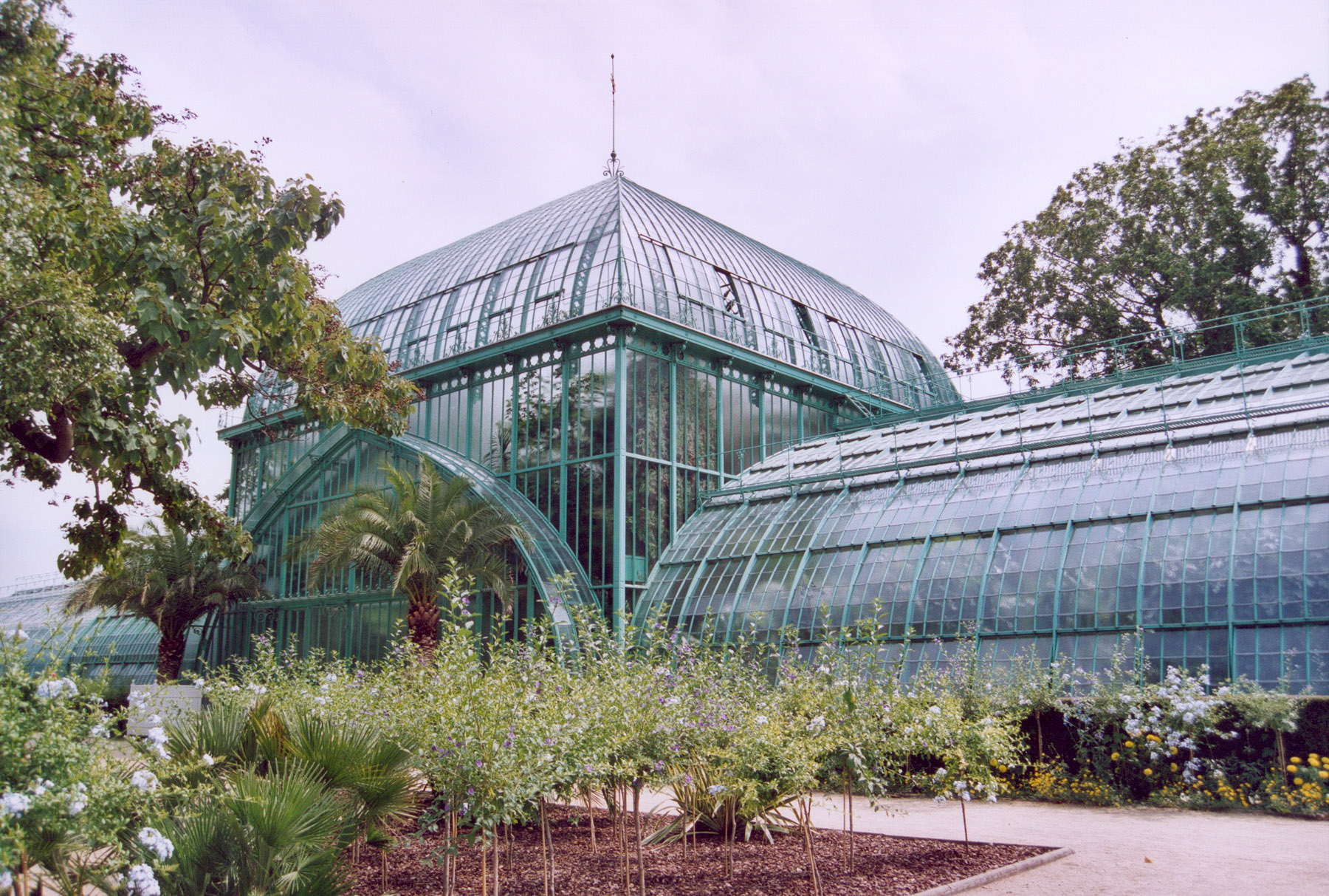 Paris : Jardin des serres d'Auteuil Exposition 1999